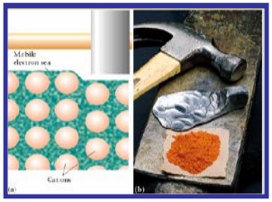 Metalen propietate mekanikoak